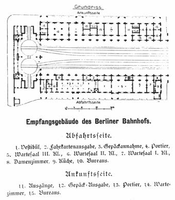 Hallenplan des Empfangsgebäudes des Berliner Bahnhofes in Hamburg-Altstadt